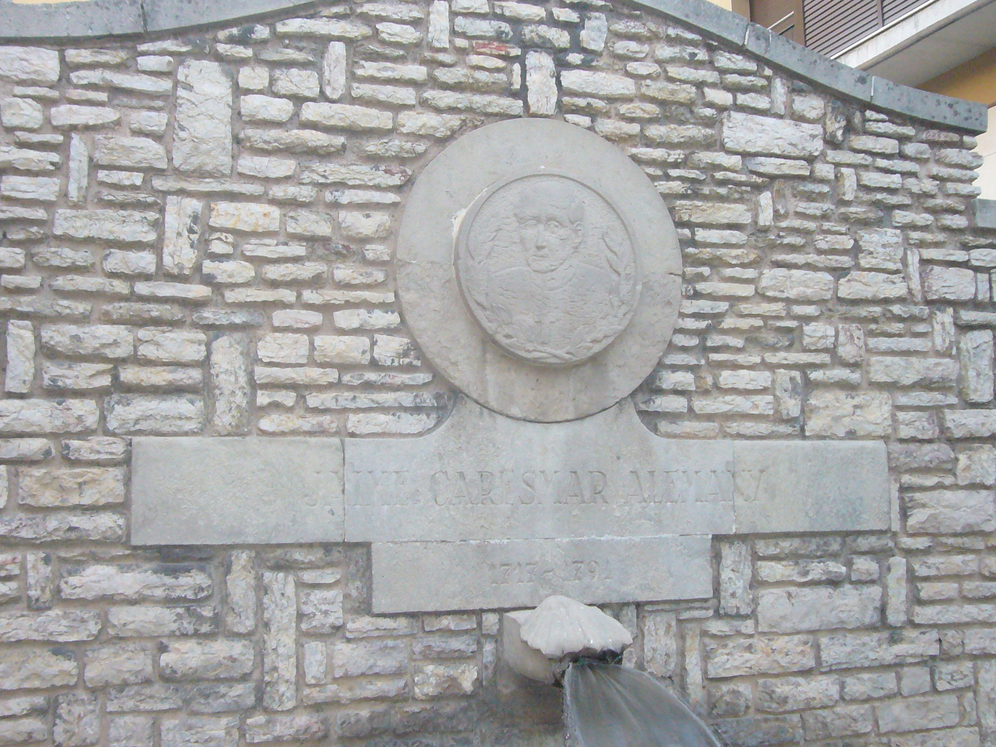 Font dedicada a Jaume Caresmar. Situada a la travessia de sant Jaume, d'Igualada, prop del passeig de les Cabres.